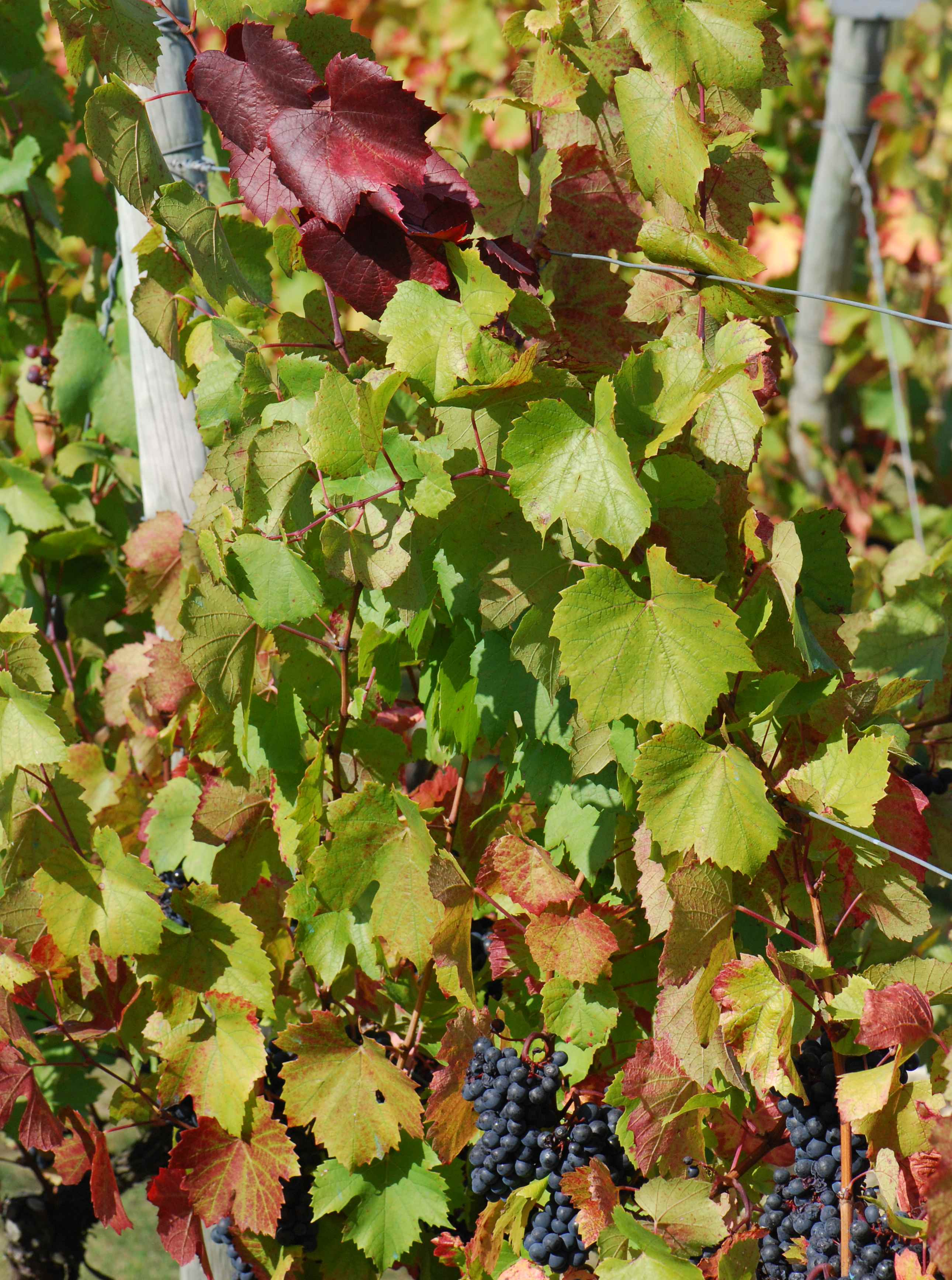 Gamay de Bouze, conservatoire du vignoble charentais, Cherves 17